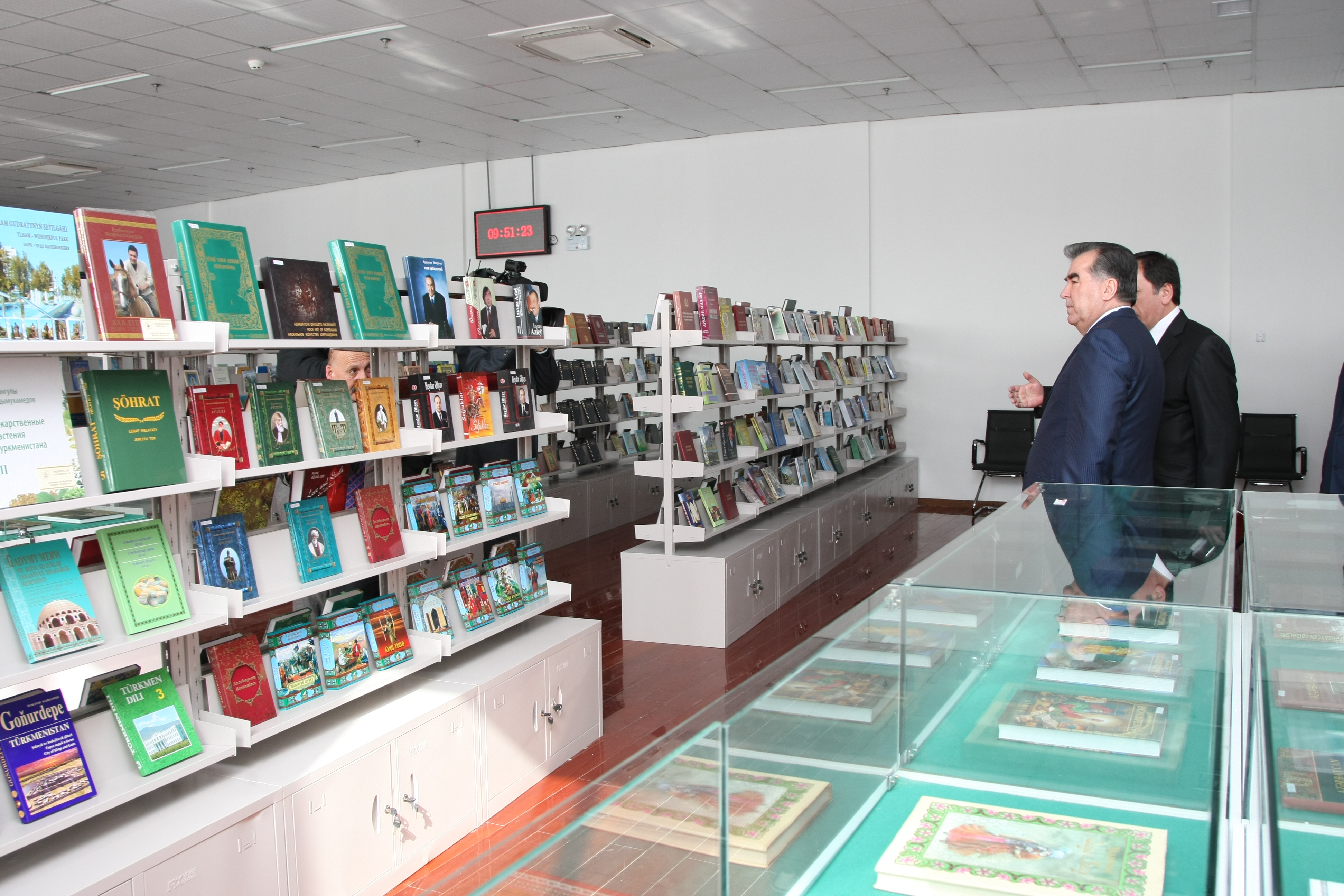 г. Душанбе, 2011 год